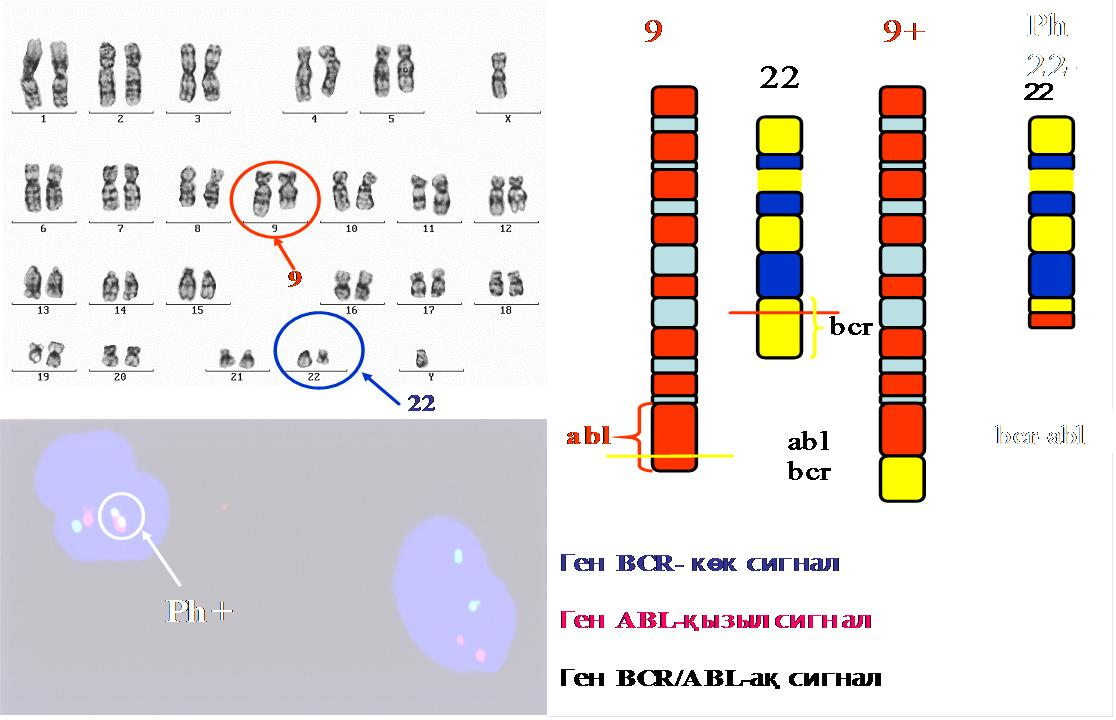 СМЛ кезіндегі хромосомдық өзгерістер